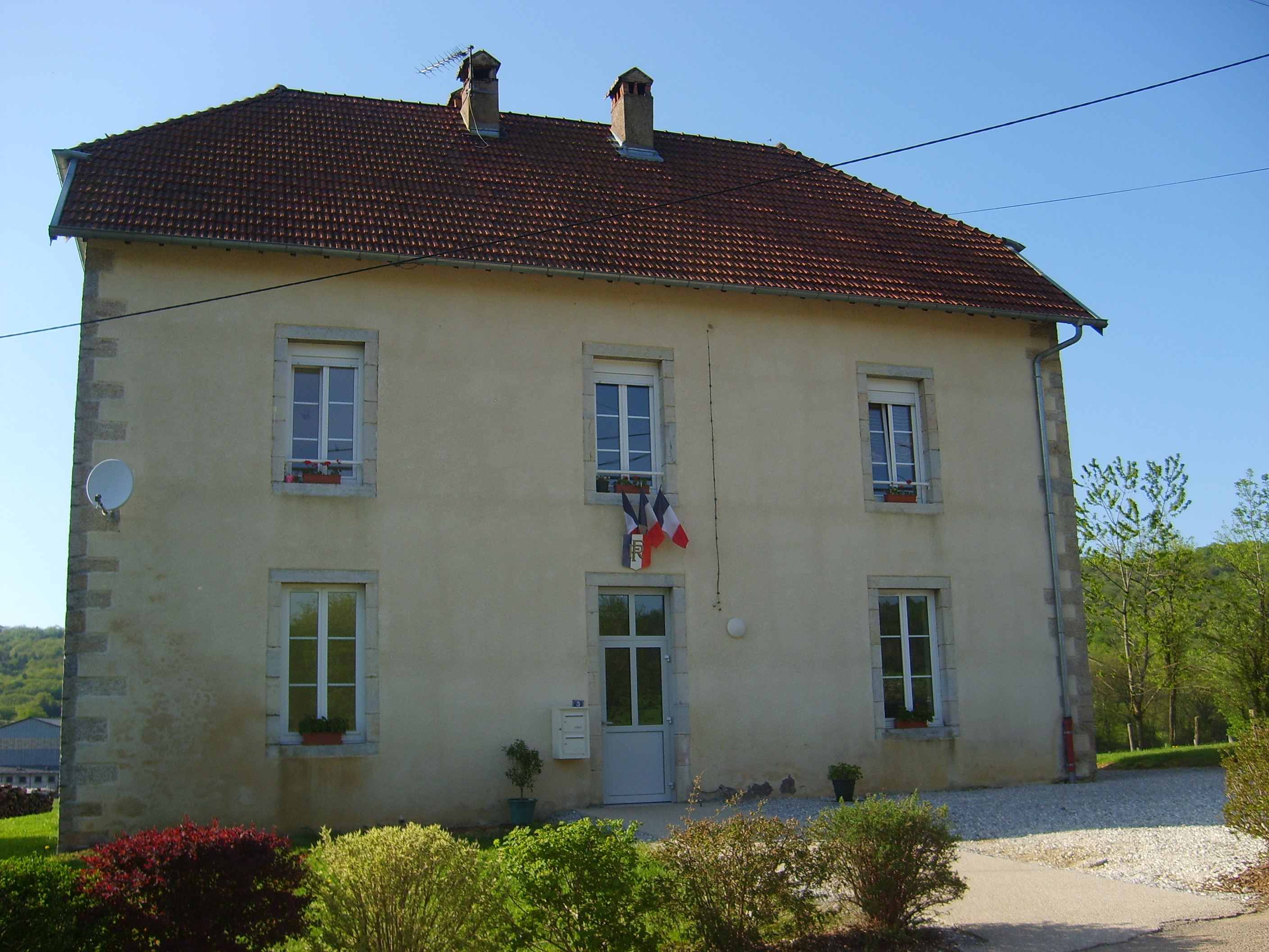 Mairie de Courtetain-et-Salans